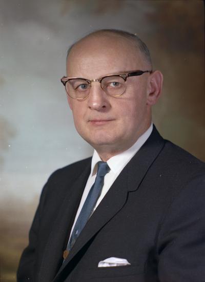 Senator George W. Kupka, 1967